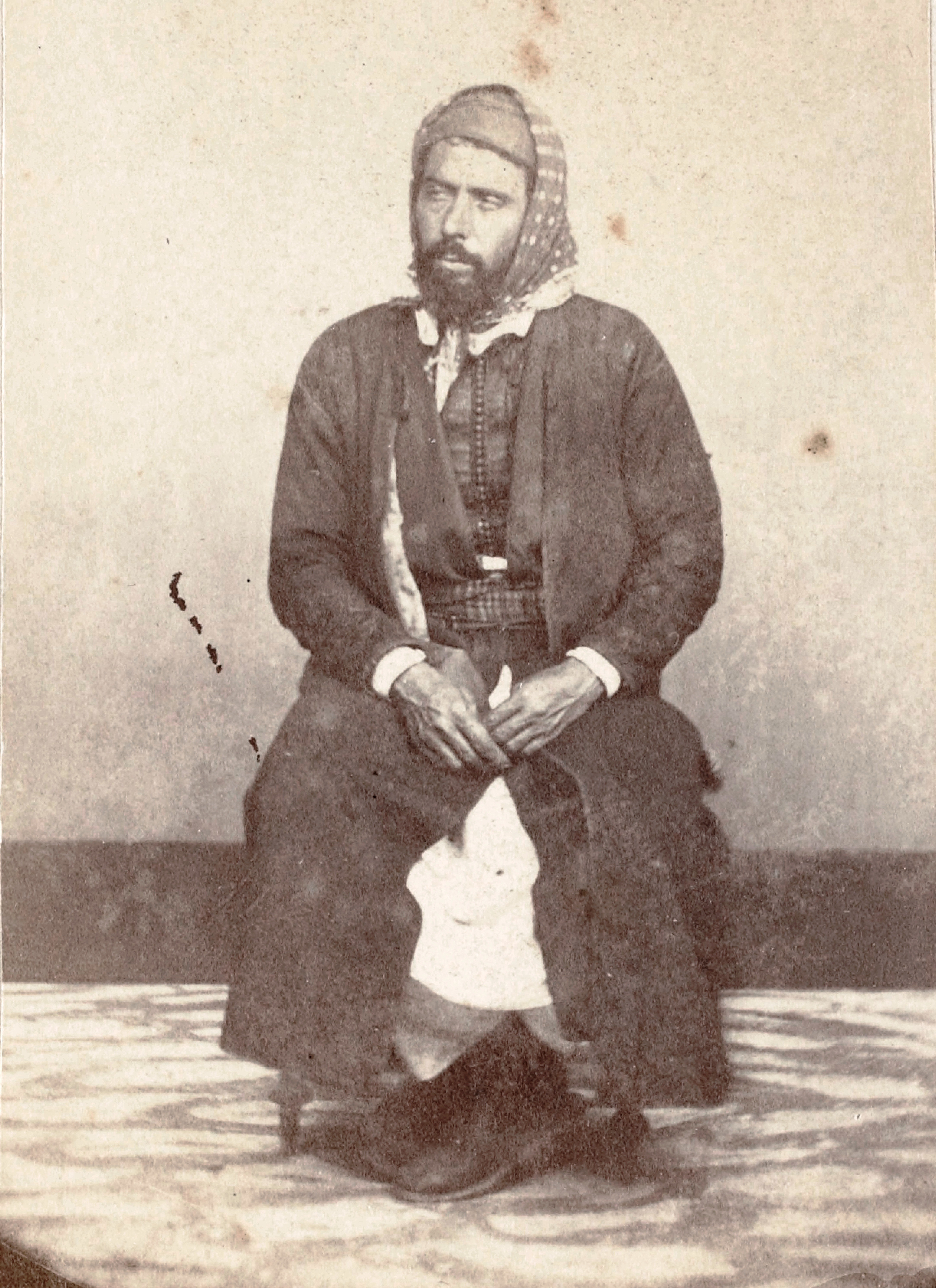 [Rabbin Mardochée à Mogador] / [Charles F. Hecquard, phot.]